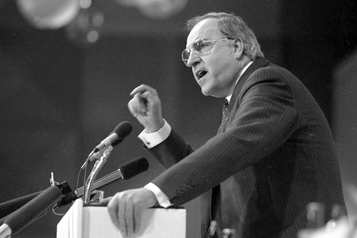 19.01.1983 CDU-Wahlkundgebung mit Bundeskanzler Dr. Helmut Kohl.